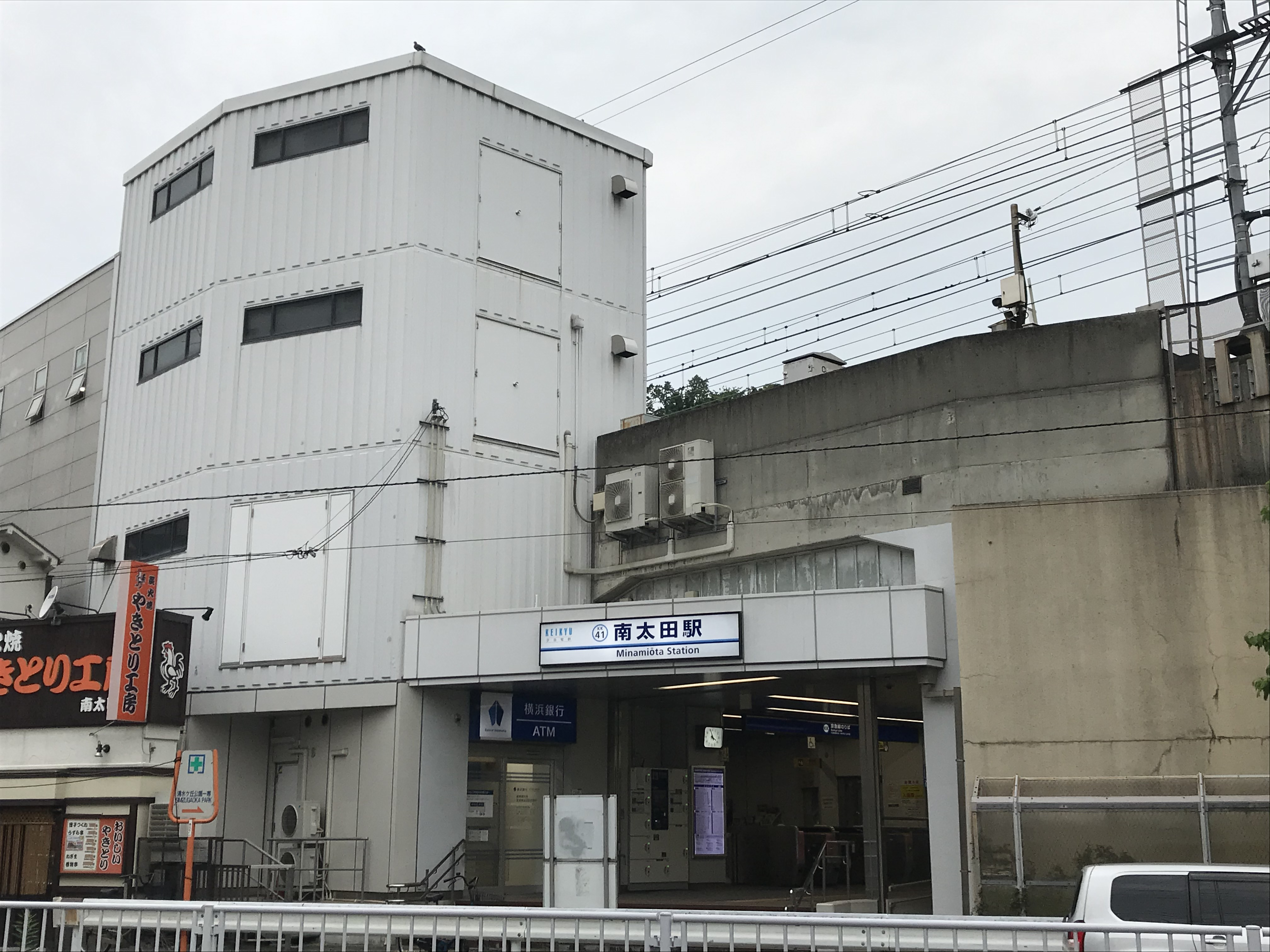 京急本線 南太田駅